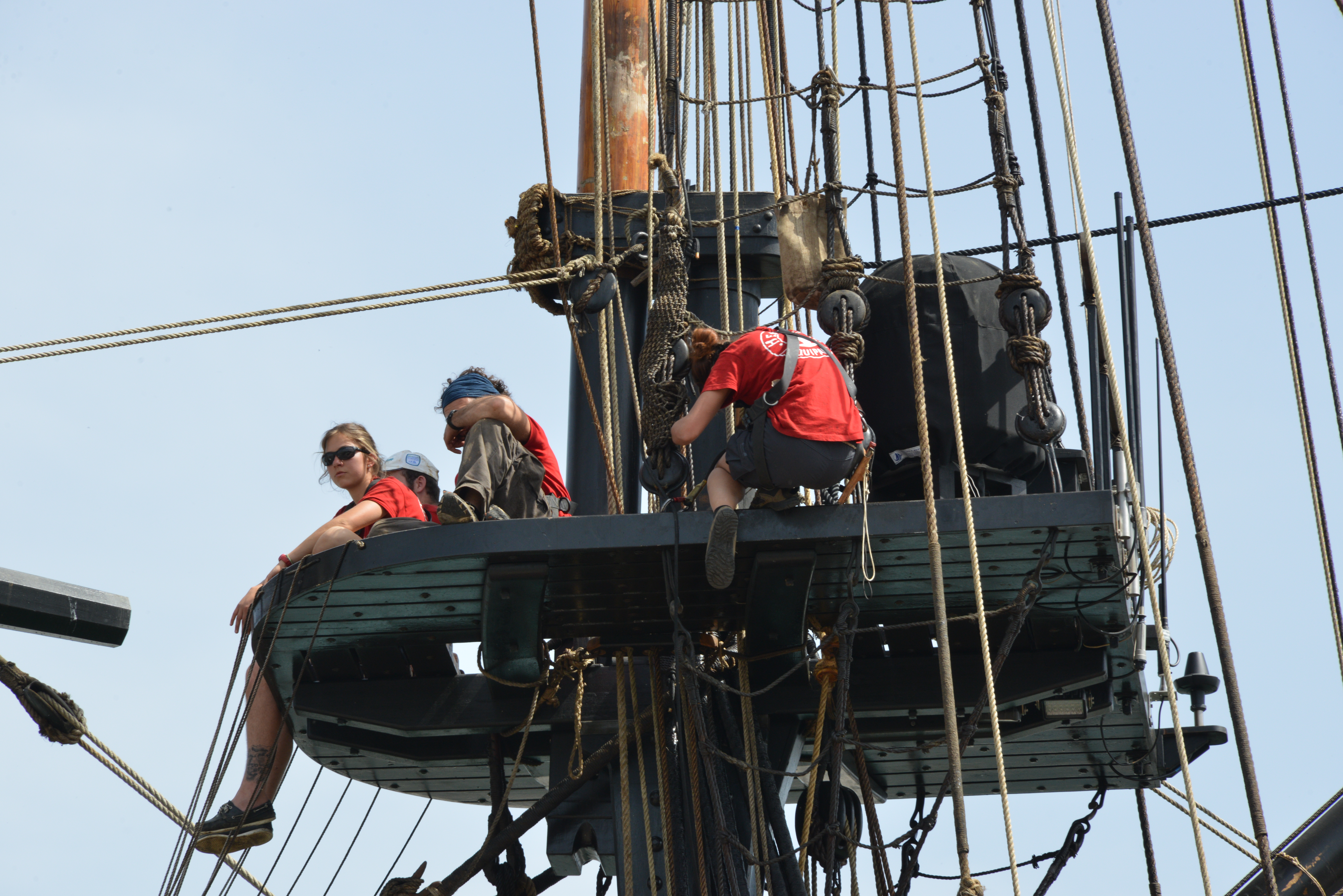 Gabiers et gabières dans le gréement. L’Hermione sortant du Bassin des Chalutiers. Départ de L’Hermione de La Rochelle du mercredi 15 avril 2015. La Rochelle, Charente-Maritime, France.